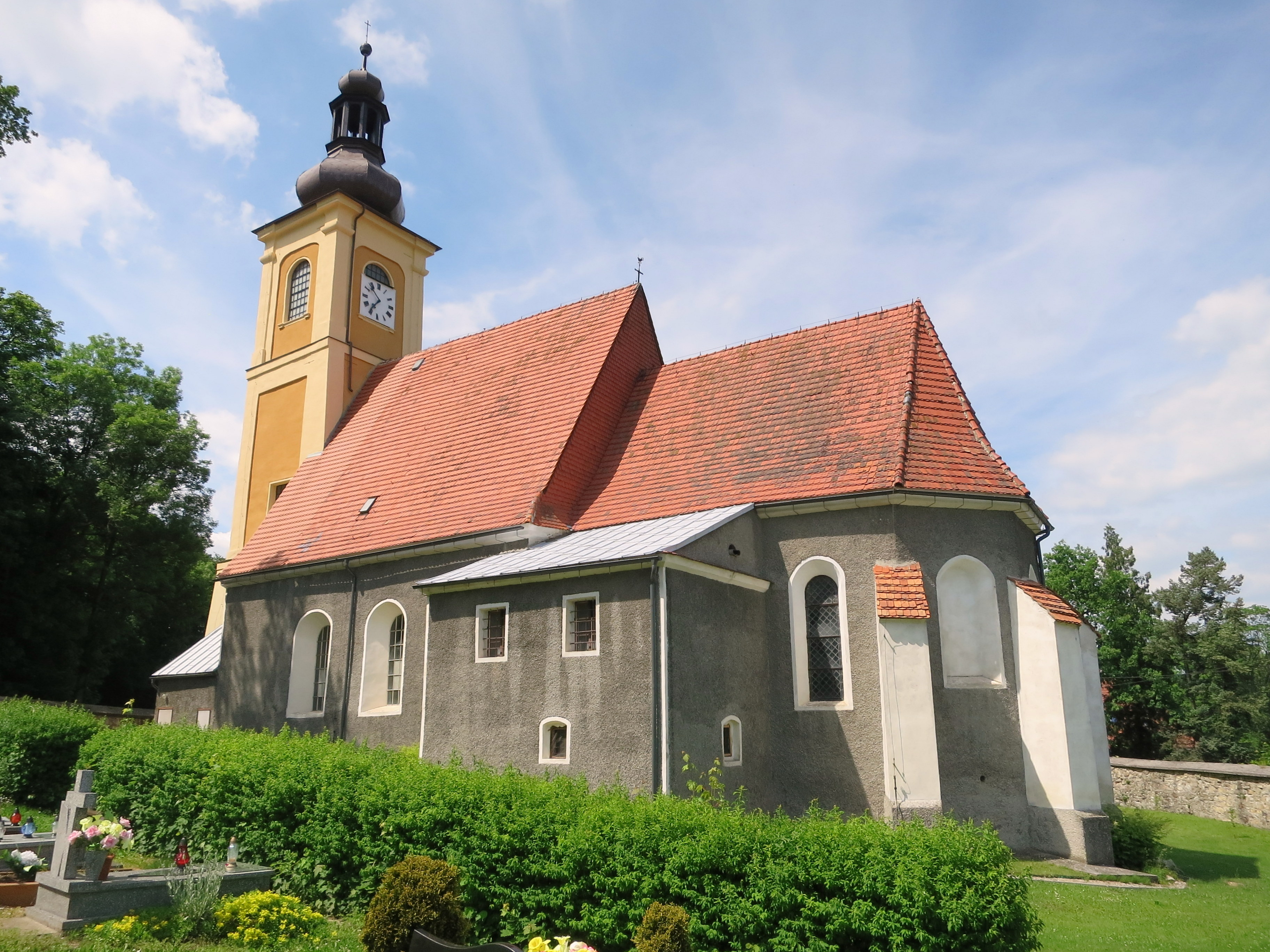 Teil der Tour der Denkmäler Niederschwedeldorf